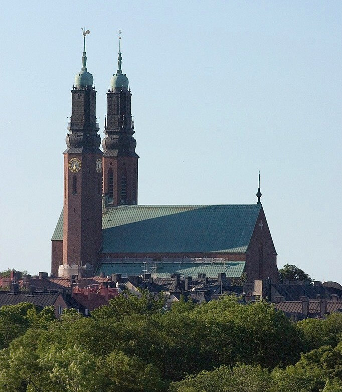 Högalidskyrkan